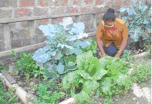 Huerto urbano en producción.